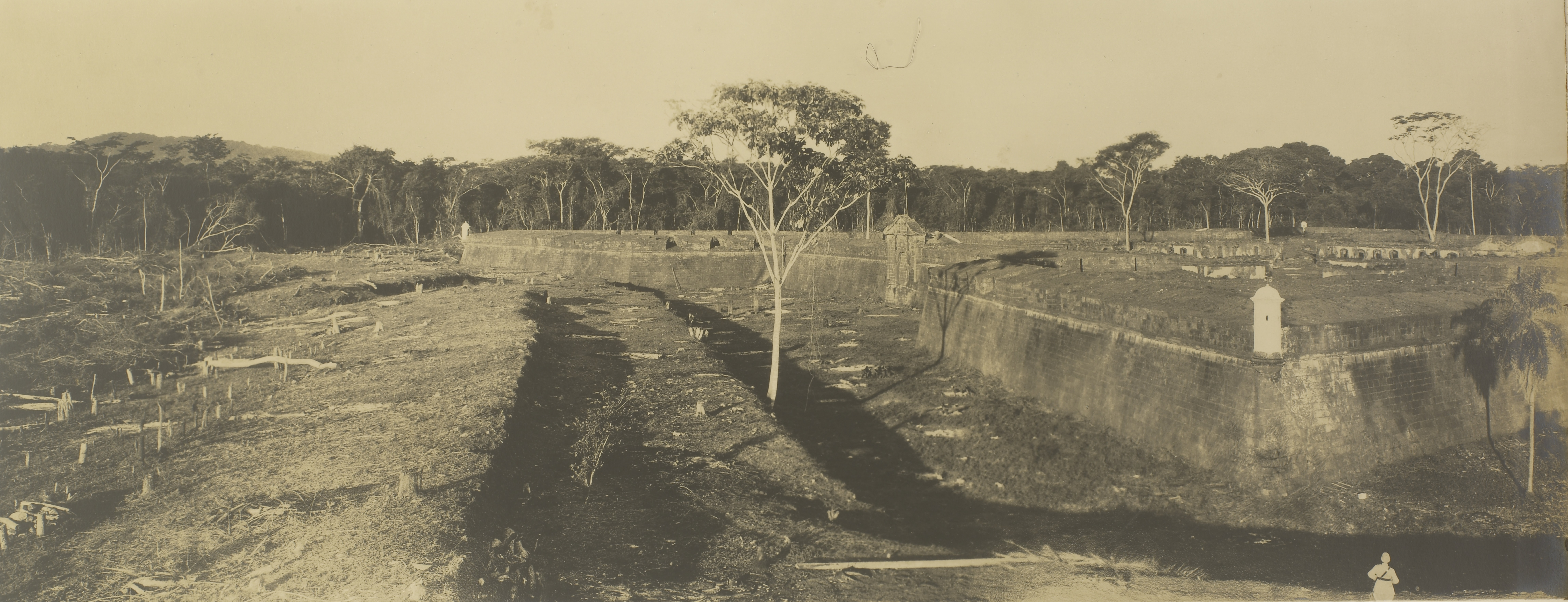 Imagem do Fundo Ministério da Guerra, do Arquivo Nacional